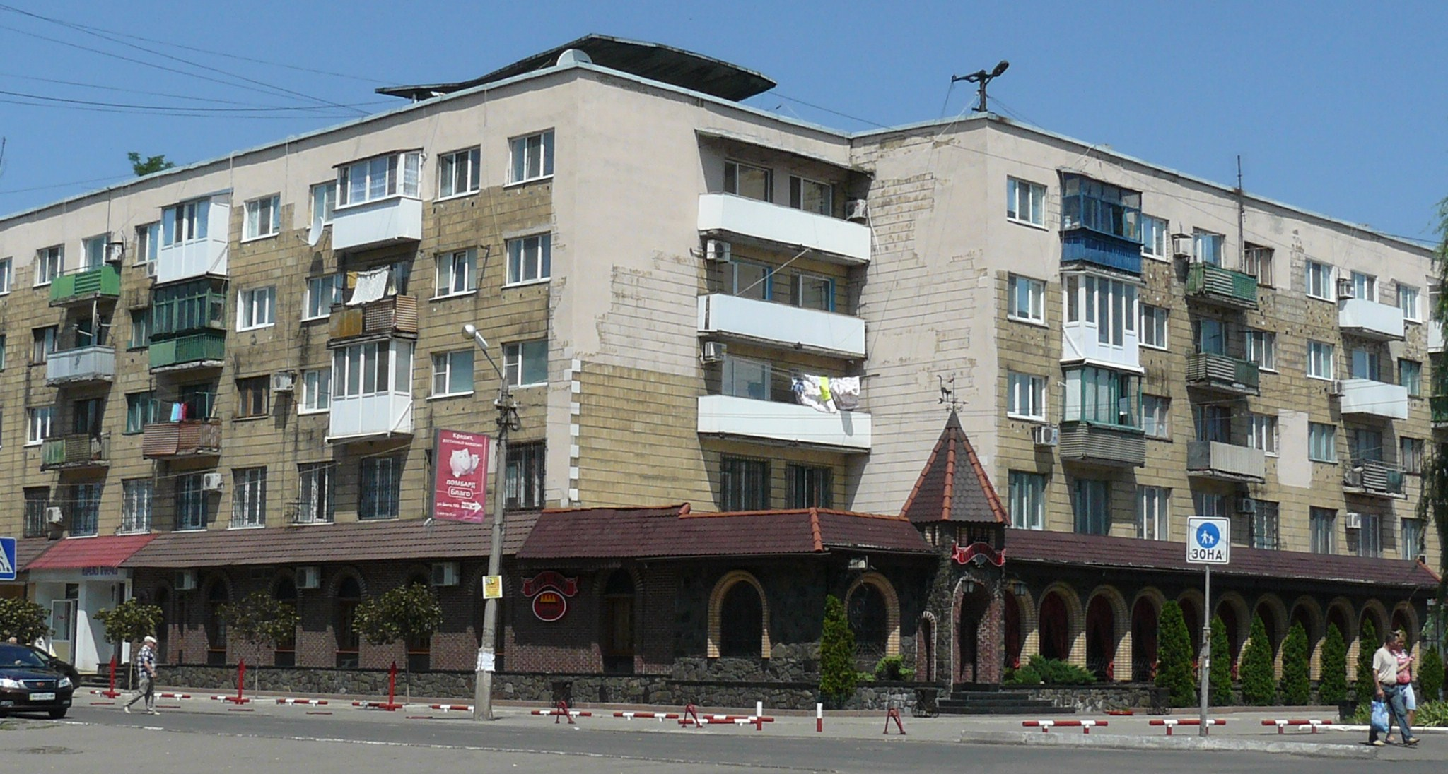 Krasnoarmijsk, centrum miasta.